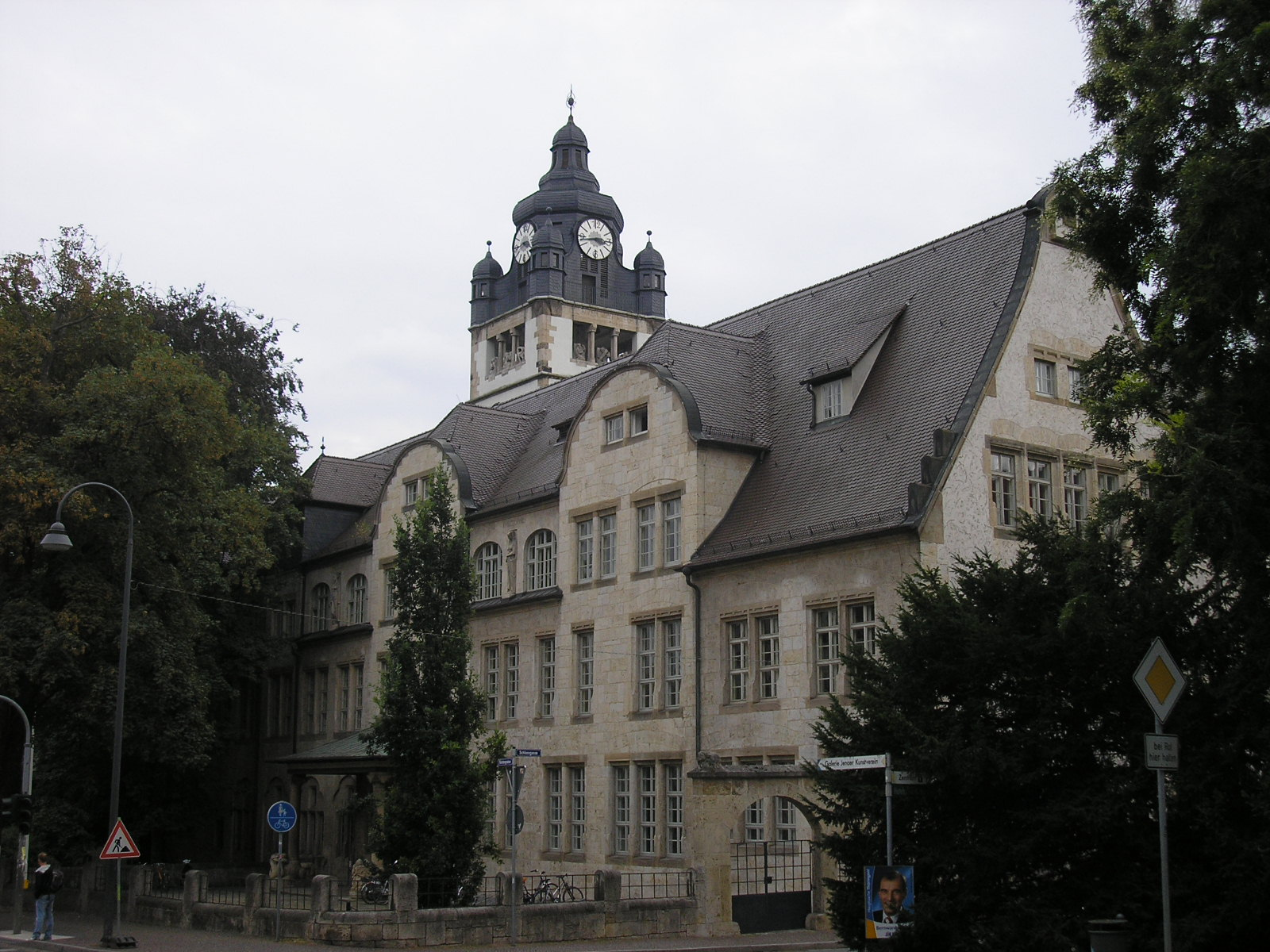 Das Universitätshauptgebäude der Friedrich-Schiller-Universität in Jena.